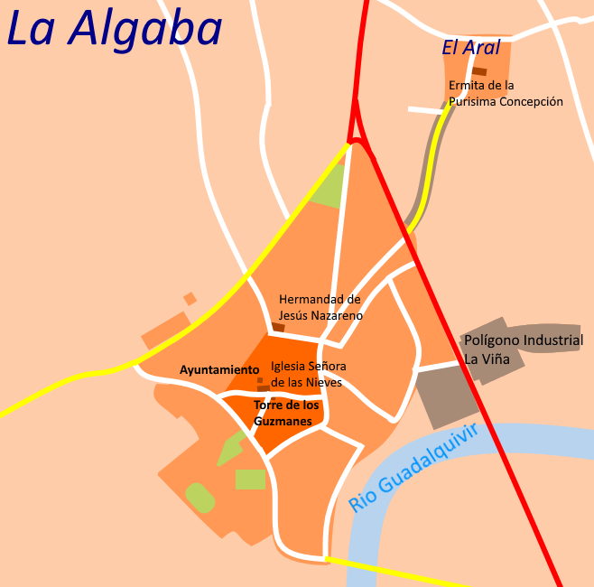 Terreno